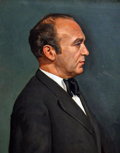 Porträt von Karl Nowotnytitle QS:P1476,de:"Porträt von Karl Nowotny" label QS:Lde,"Porträt von Karl Nowotny"